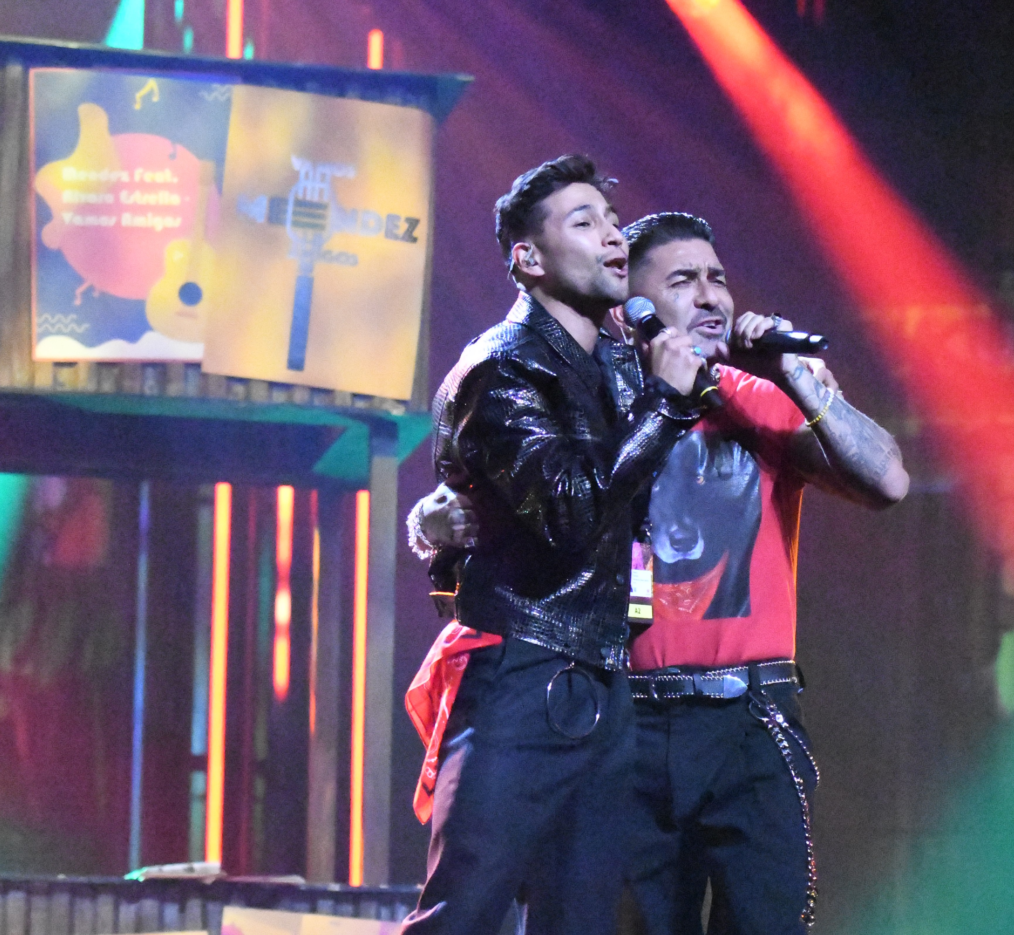 Melodifestivalen 2020, Deltävling 2, Göteborg, Méndez, Alvaro Estrella